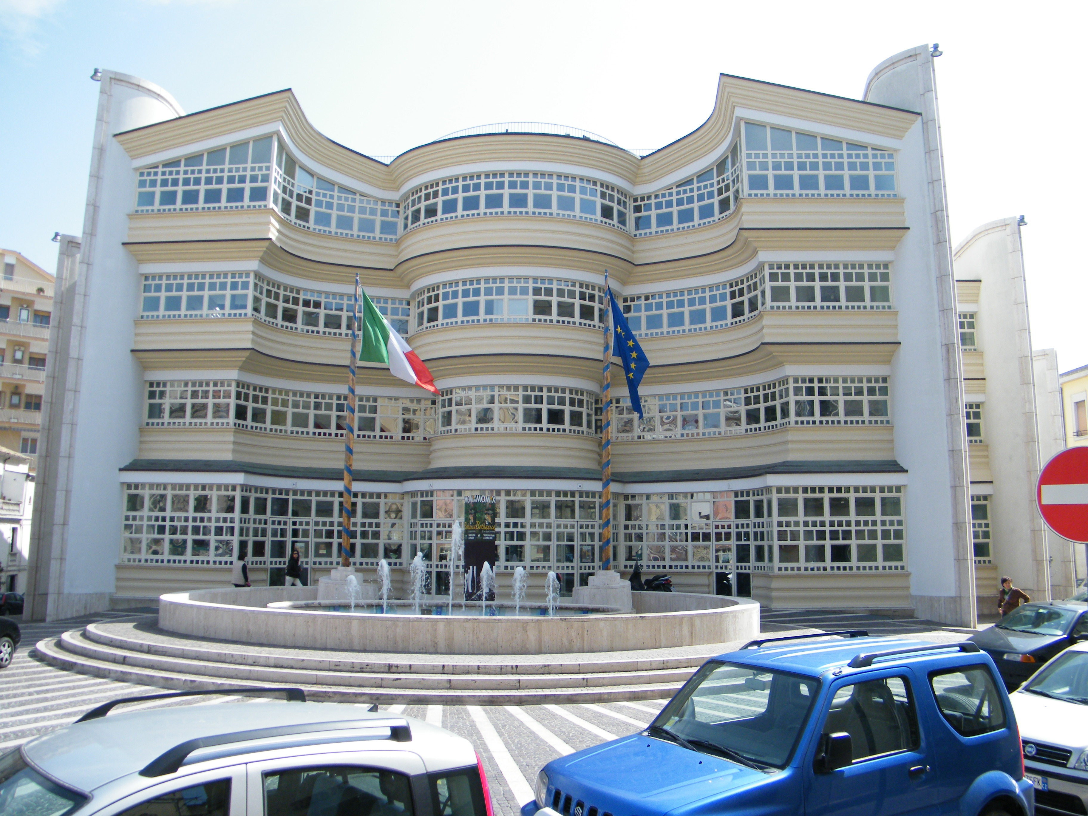 Catanzaro, nuovo teatro Politeama